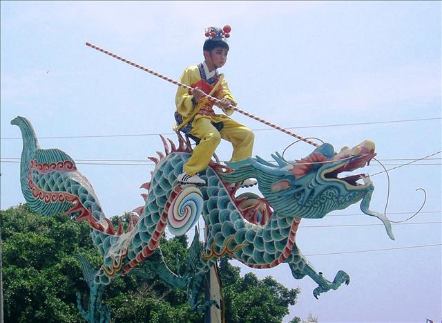 臺灣臺南縣學甲鎮藝閣（哪吒鬧東海）。